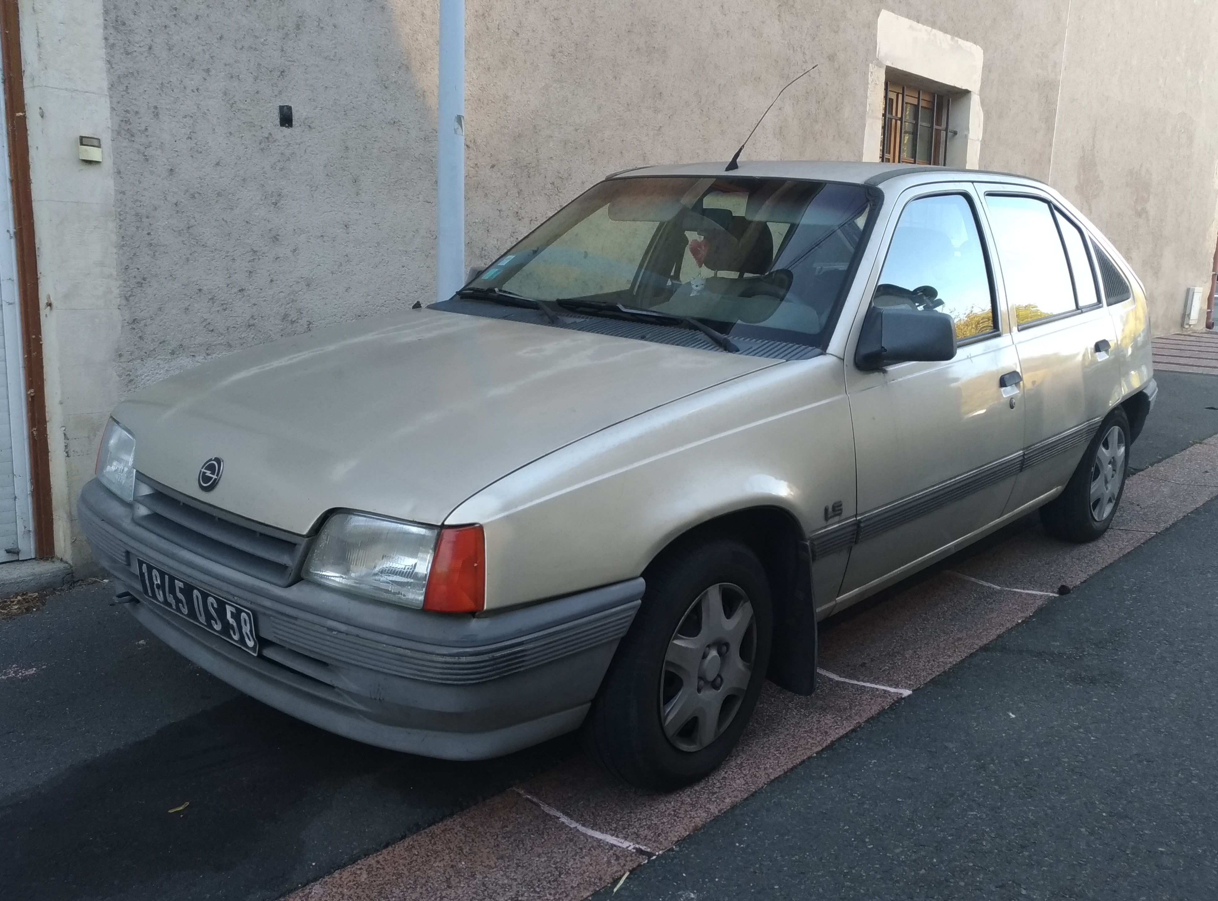 1990 Opel Kadett (1.3 75 hp) at Nevers